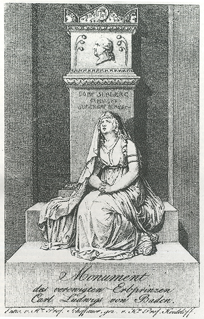 Erbprinz-Karl-Ludwig-Denkmal, Kupferstich.